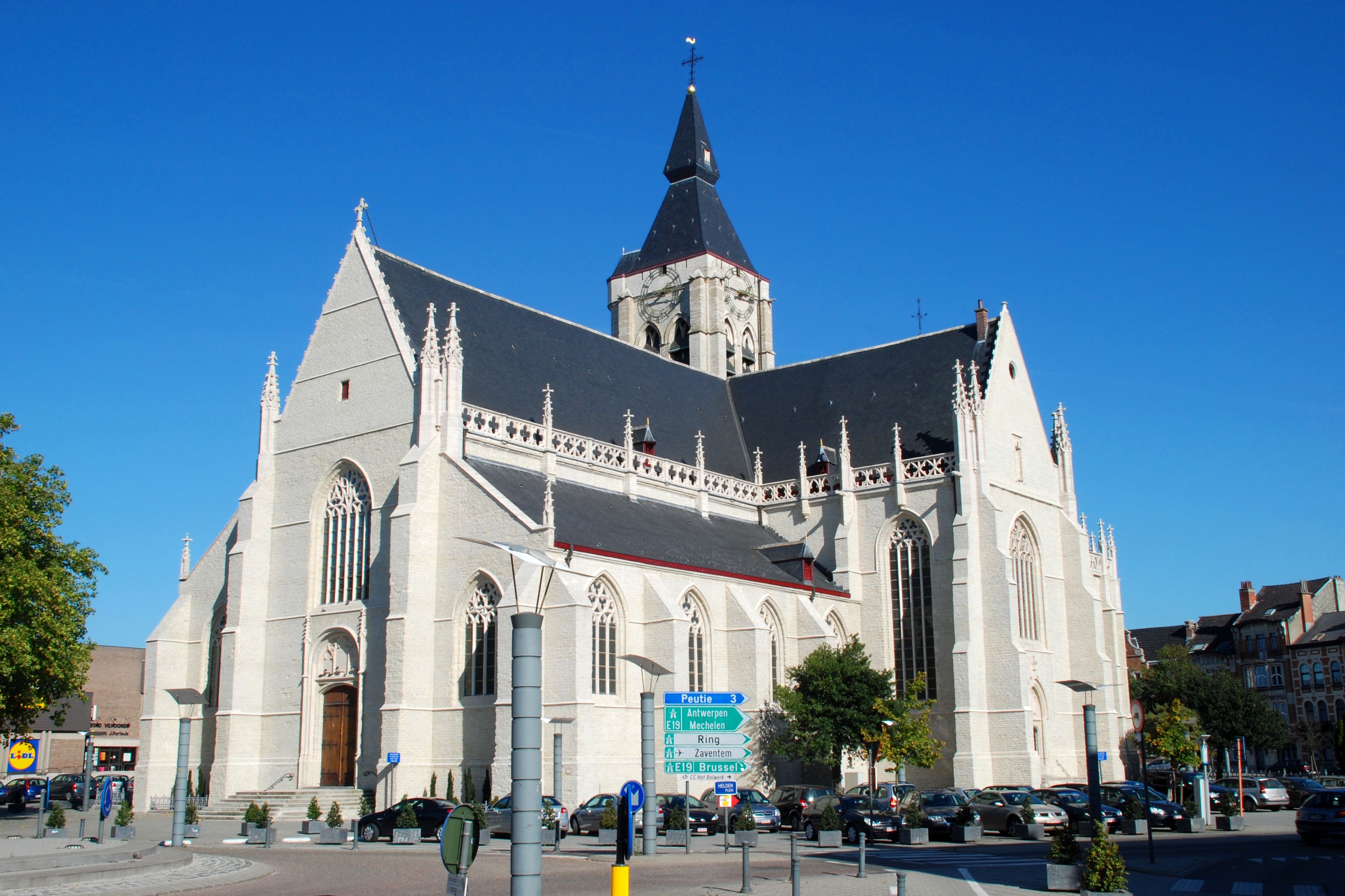 Belgique - Brabant flamant - Église Notre-Dame de Bonne-Espérance de Vilvorde